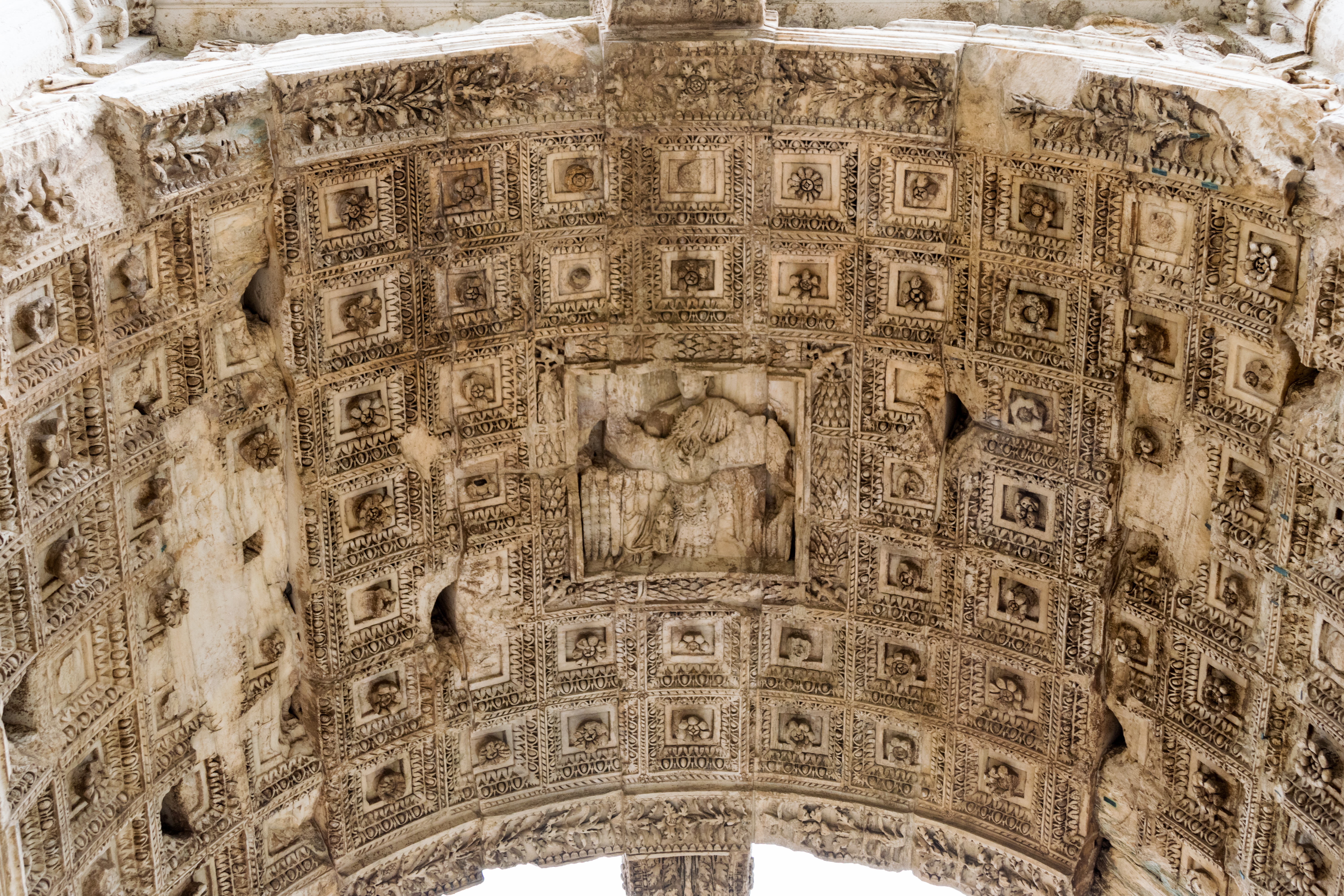 Triumphbogen Titus (Kassettenansicht) im November 2016